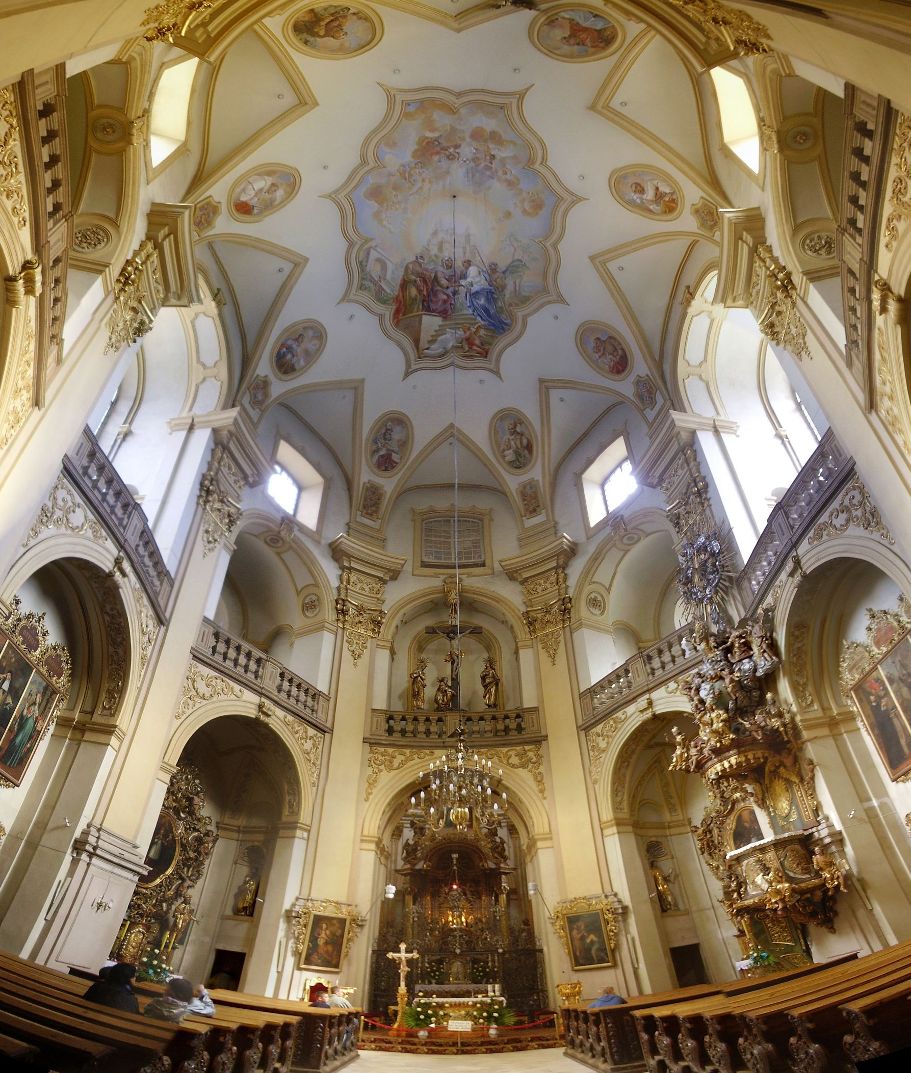 Bazylika pod wezwaniem Nawiedzenia NMP w Wambierzycach